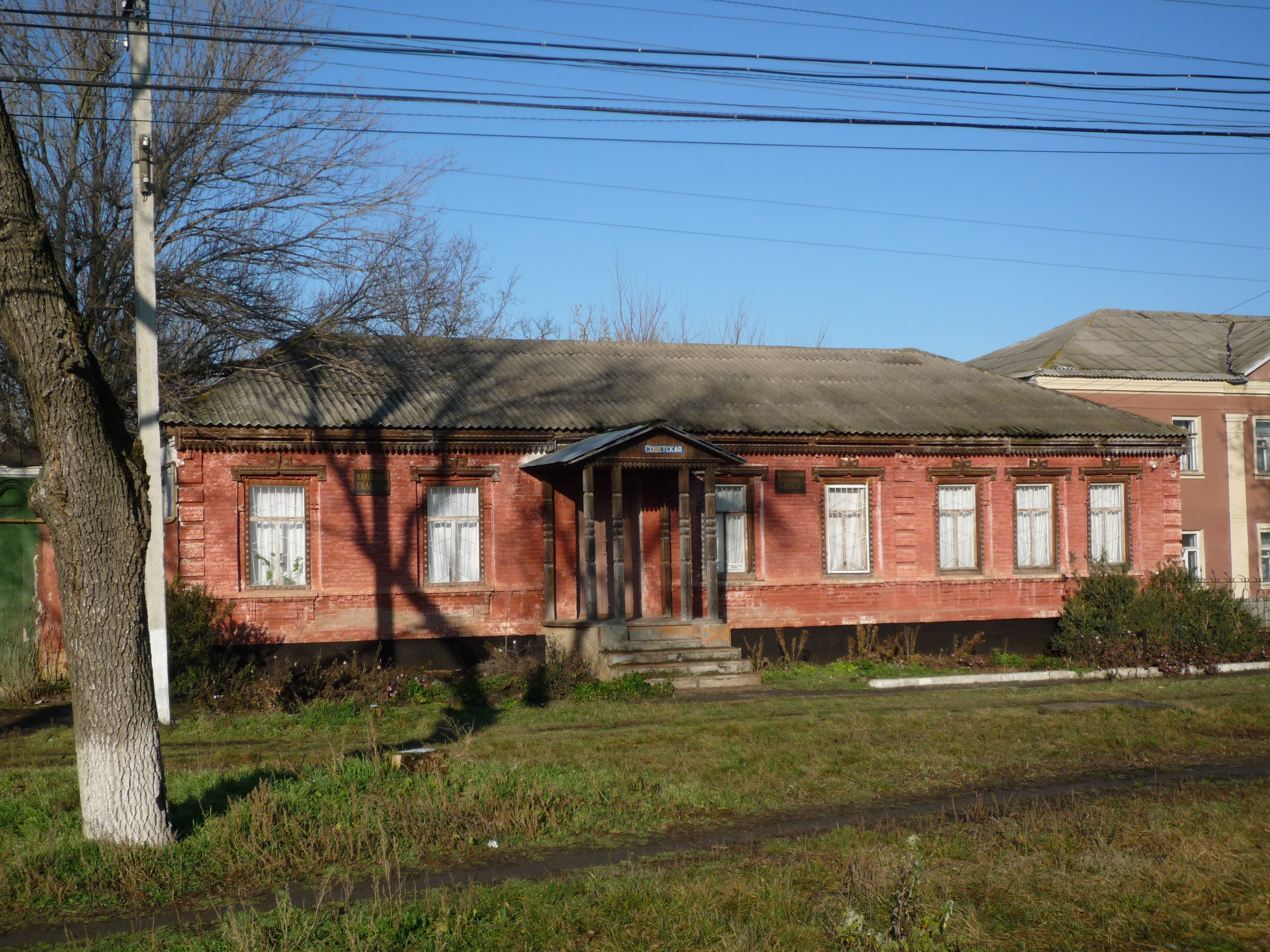 Краеведческий музей с. Кугульта.